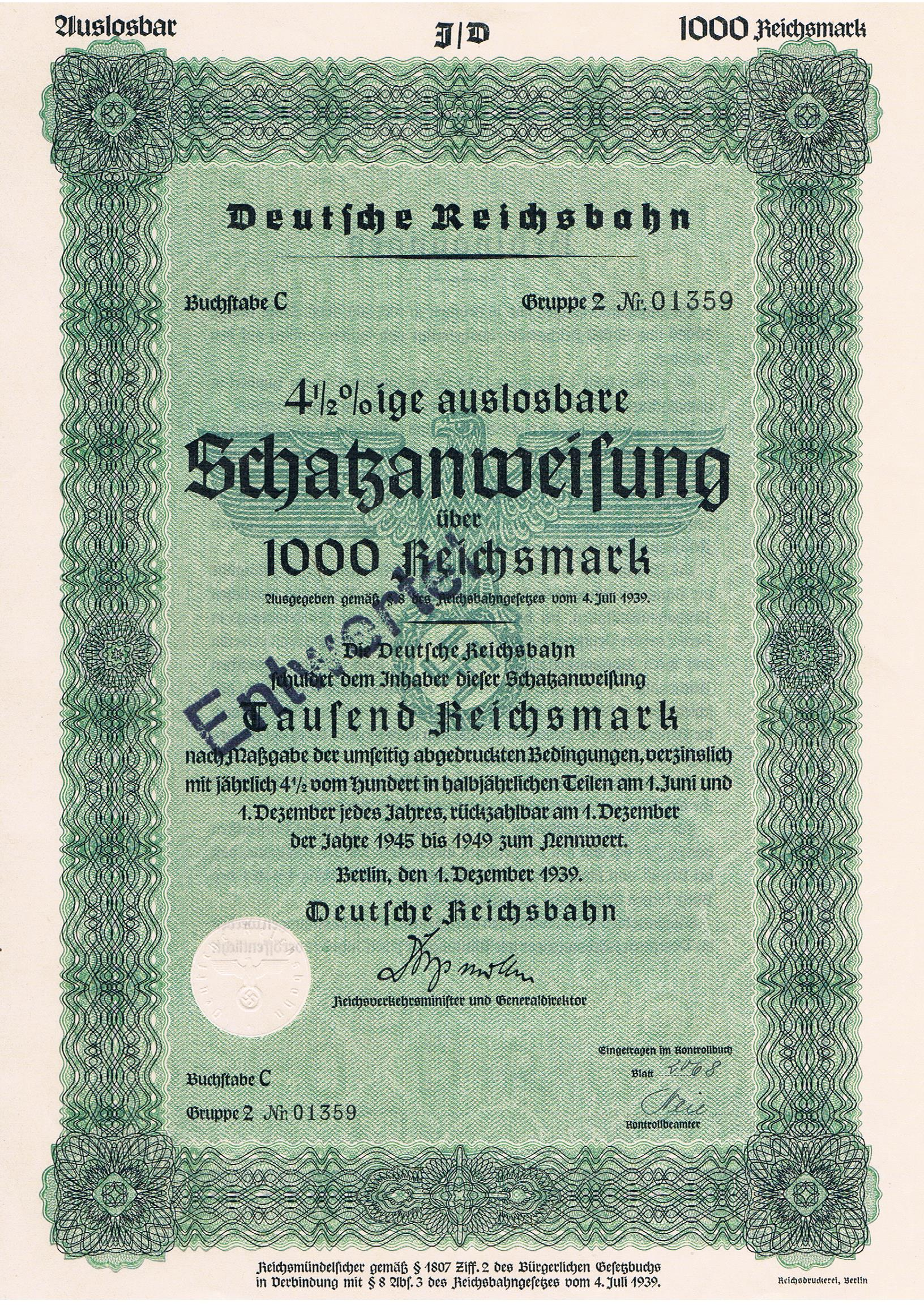 Schatzanweisung der Deutschen Reichsbahn von 1939